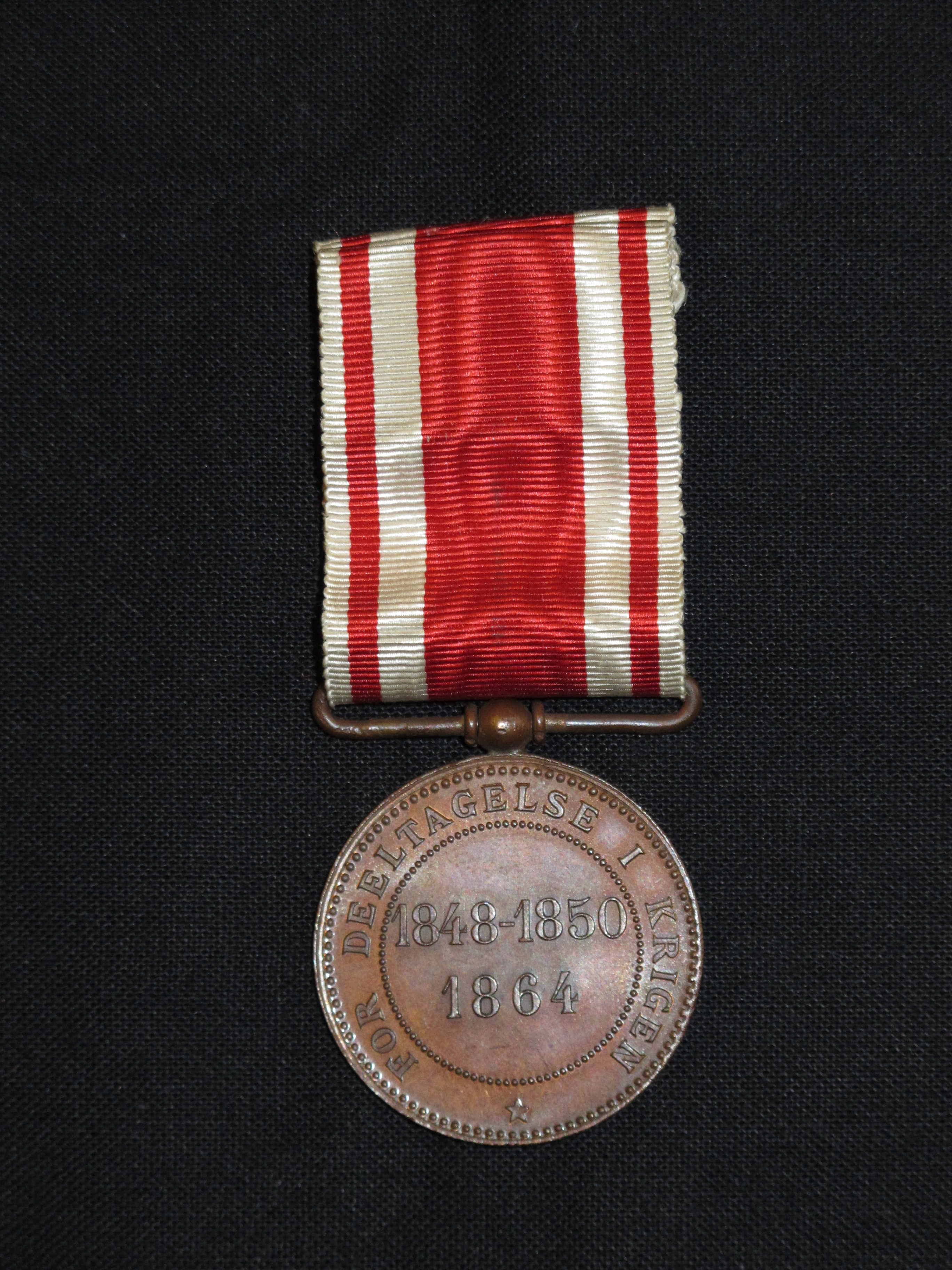 Erindringsmedalje for krigsdeltagelse i krigen 1848-50 og 1864.